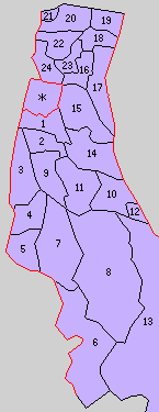 富山県上新川郡の町村。